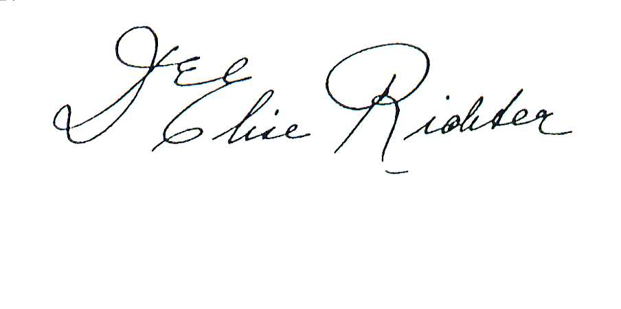 Elise Richter Signatur 1927 Unterschrift zu einer autobiographischen Skizze in Führende Frauen Europas, 2 Bände. München 1928 und 1930